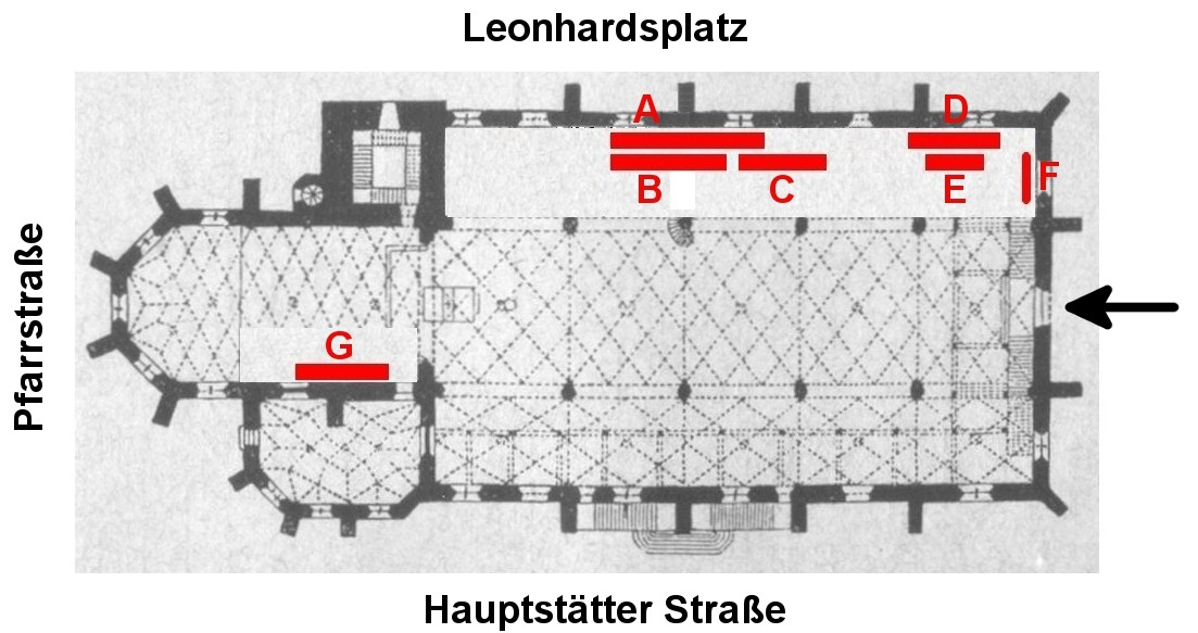 Grundriss der Leonhardskirche mit Markierung des Chorgestühls (rot).A = Westfassade, freie AbschlusswangeB, C = hintere Sitzreihe an der Südwest- bzw. SüdostfassadeD, E = vordere Sitzreihe an der Südwest- bzw. SüdostfassadeF = Sitzreihe an der Nordostfassade des ChorsZiffern, z. B. 1...5: erster und letzter Sitz einer Reihe (von links nach rechts, wenn man davorsteht).